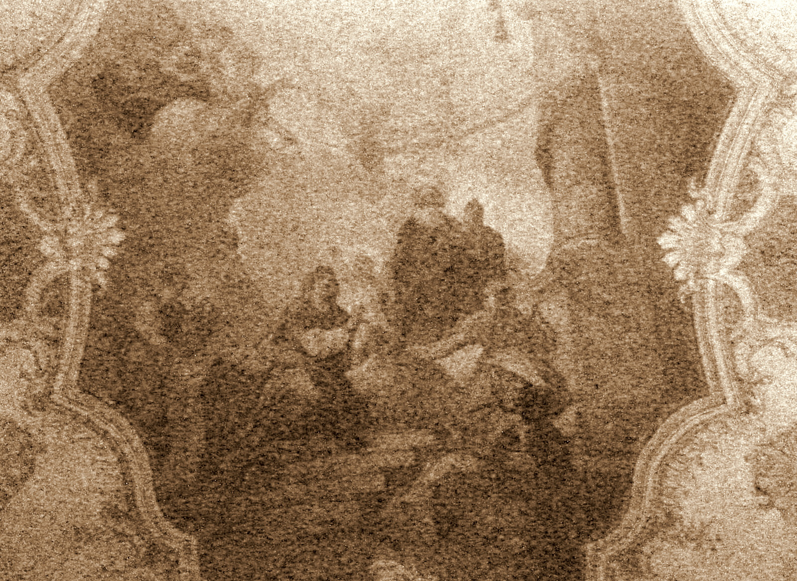 Church St. Anna, München Harlaching, Fresko